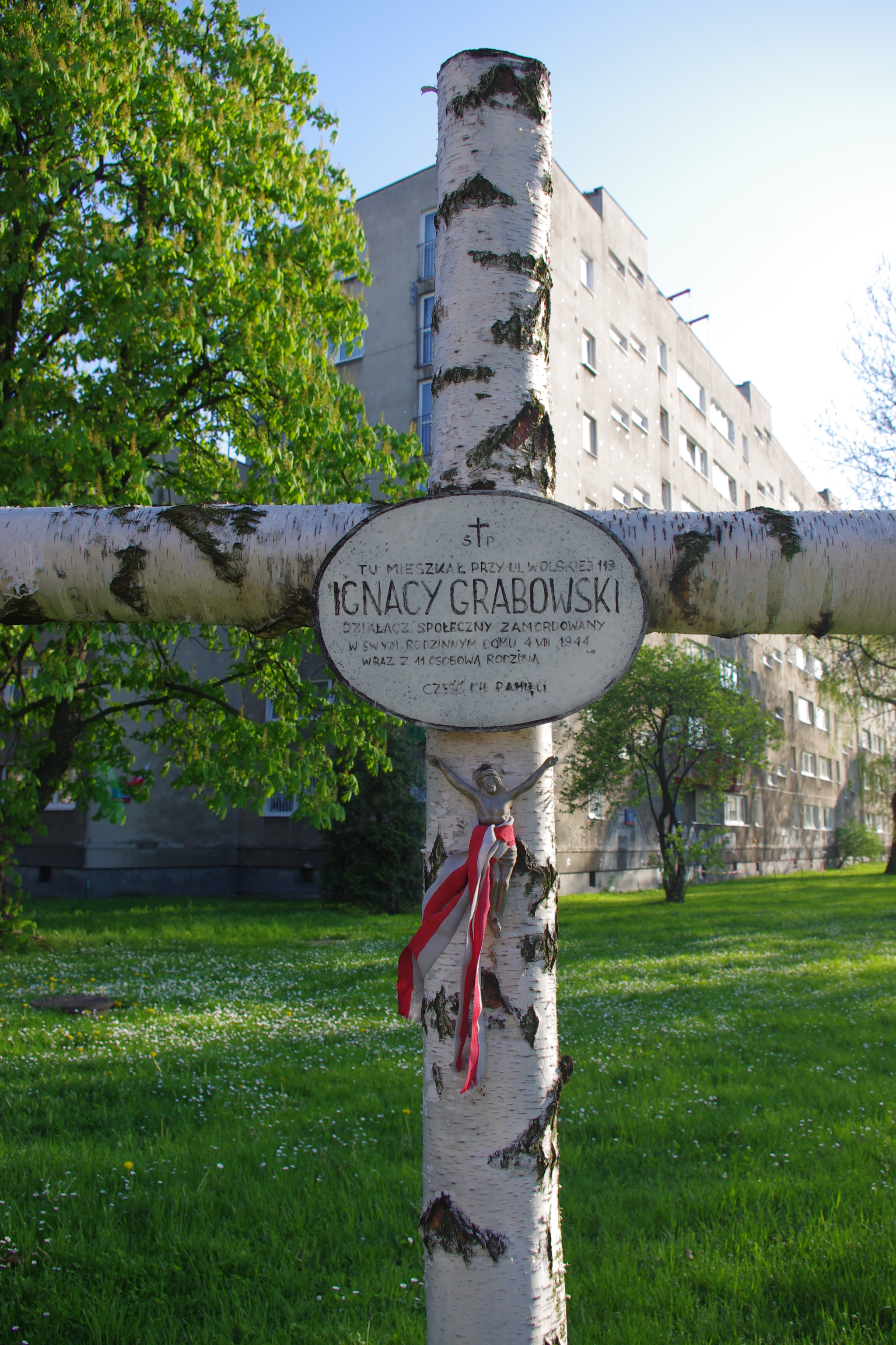 Brzozowy krzyż u wylotu ul. Grabowskiej, po jej lewej stronie przy budynku Wolska 113 w Warszawie, upamiętniający dawnego właściciela lokalnych terenów i działacza społecznego Ignacego Grabowskiego zamordowanego wraz z 11 osobową rodziną w tym miejscu, podczas powstania warszawskiego.